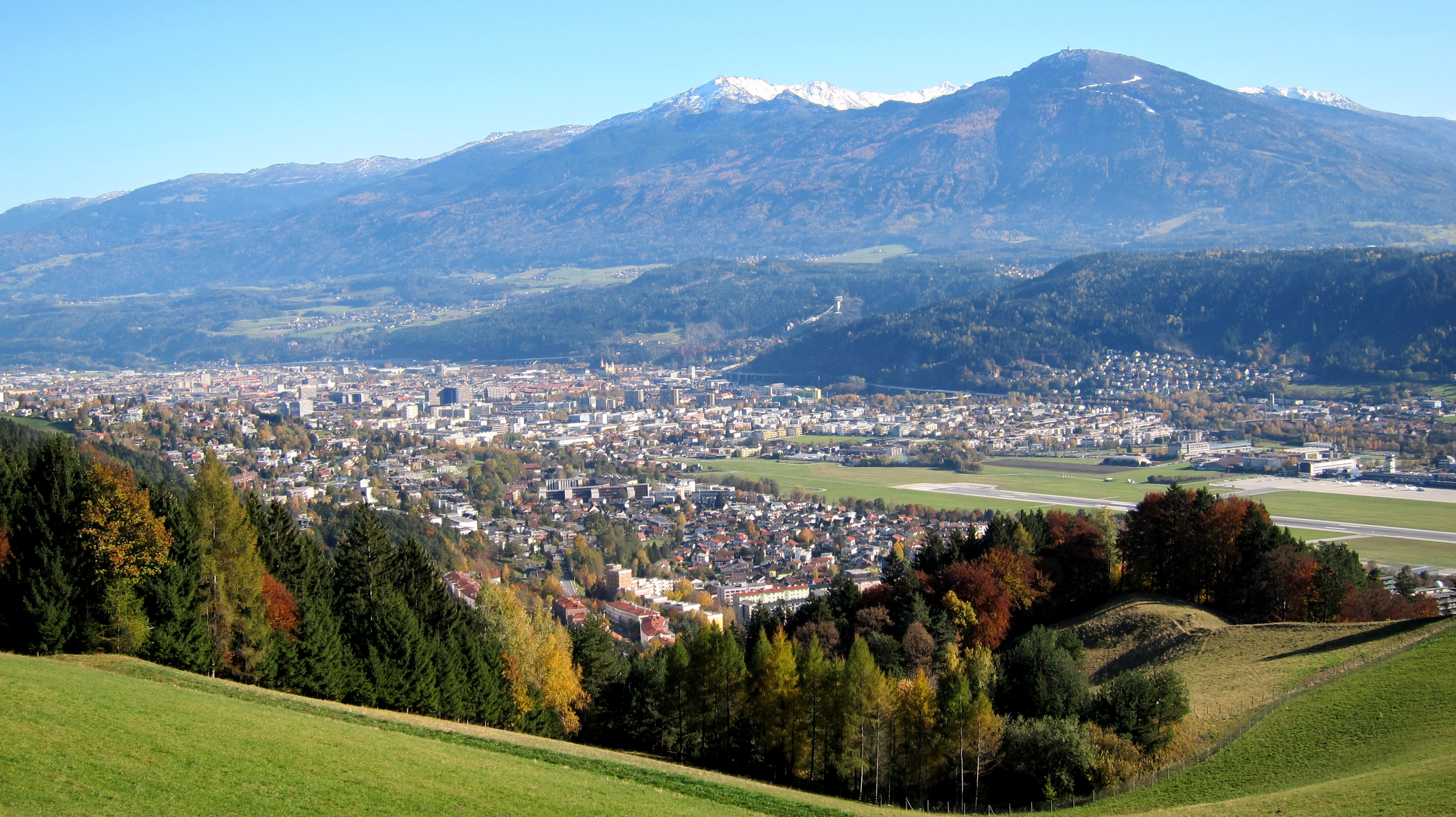 Panorama von Innsbruck vom Kerschbuchhof aufgenommen